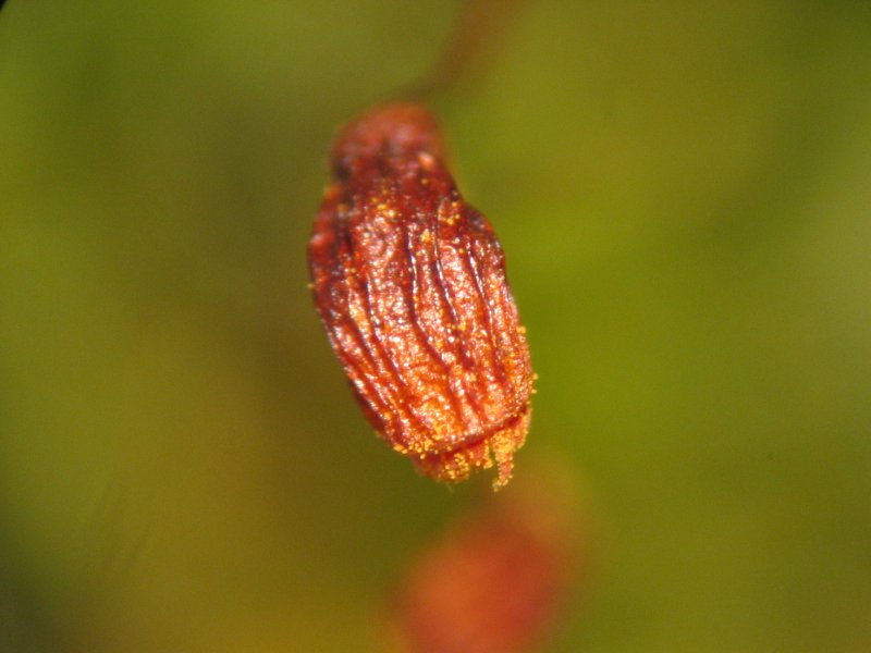 Punktiertes Wurzelsternmoos (Rhizomnium punctatum), Kapsel, 30x vergrößert